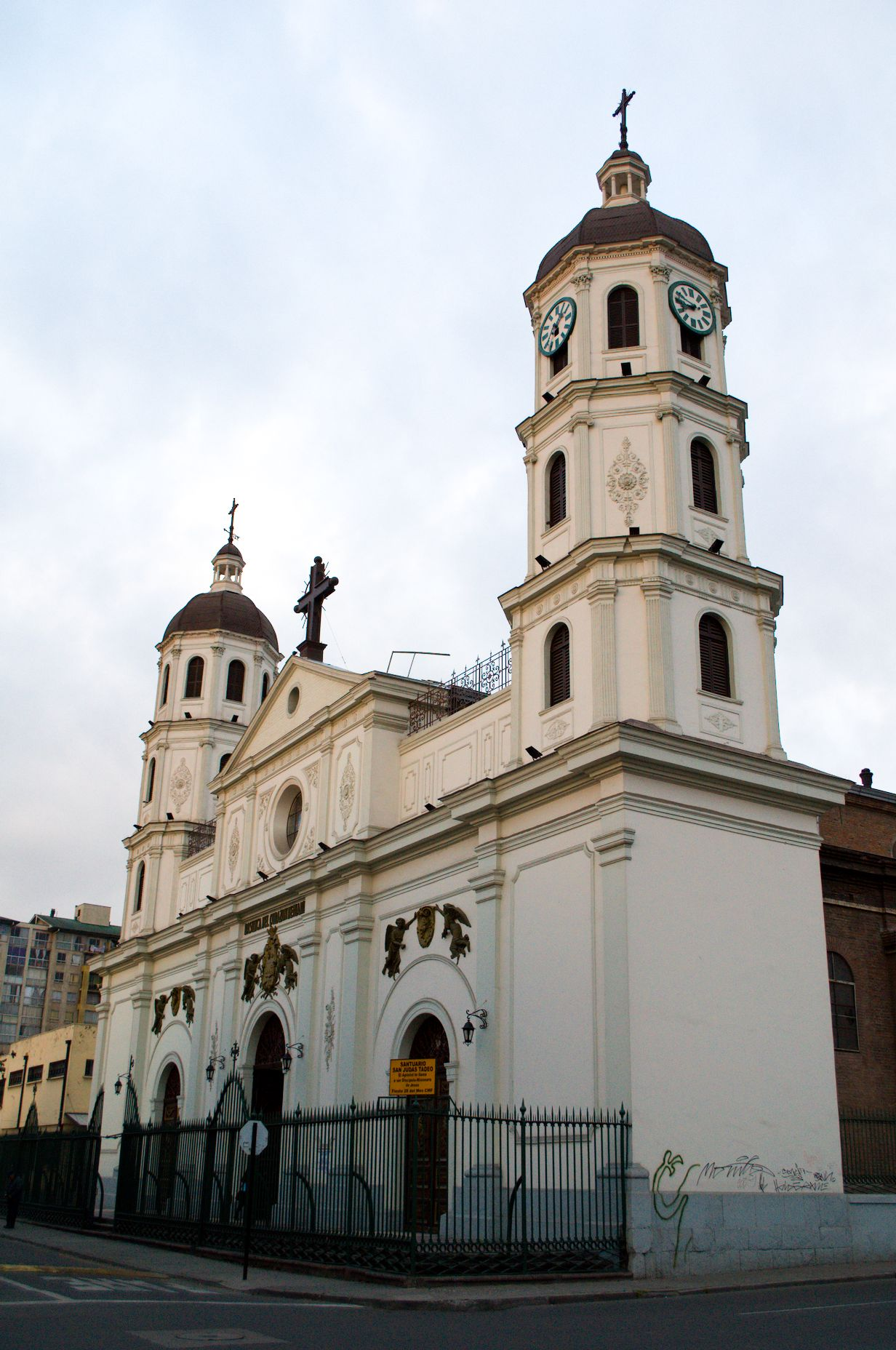 Frontis por calle Zenteno de la Basílica Corazón de María This is a photo of a national monument in Chile: 869